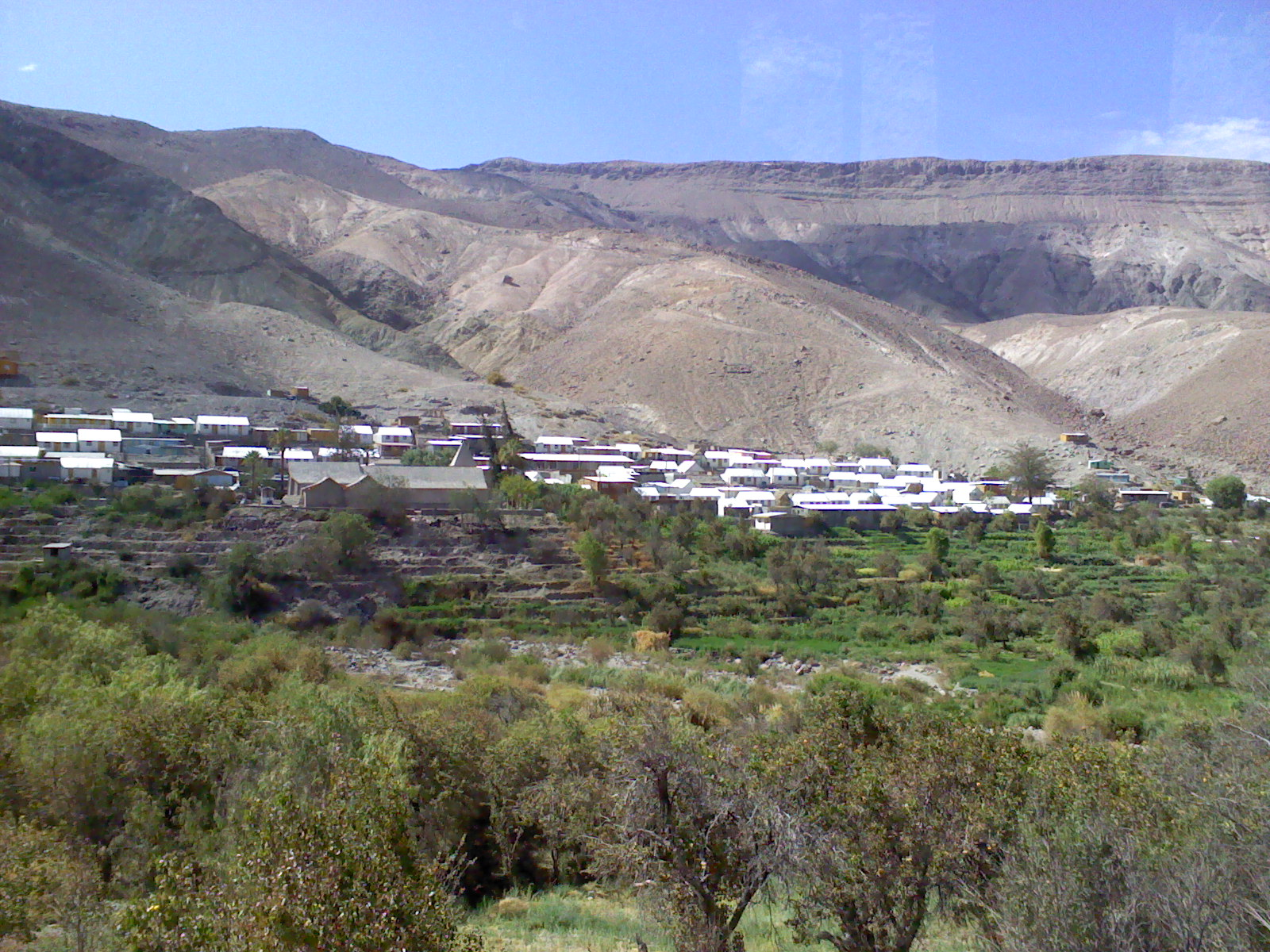 Foto de Huaviña tomada de frente, en el camino